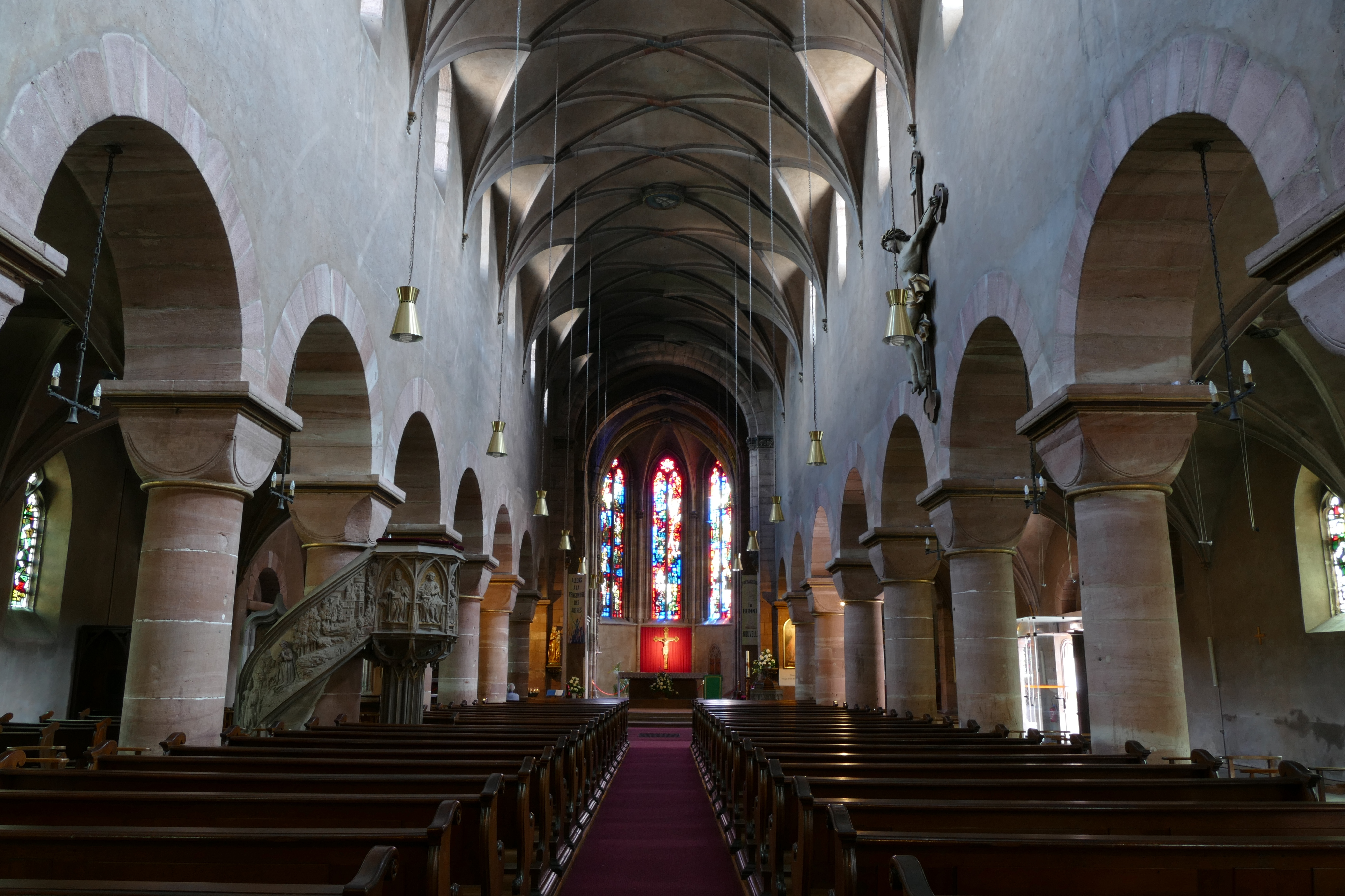 Alsace, Bas-Rhin, Église Saint-Georges de Haguenau (PA00084724, IA00061901). Vue intérieure de la nef vers le chœur.